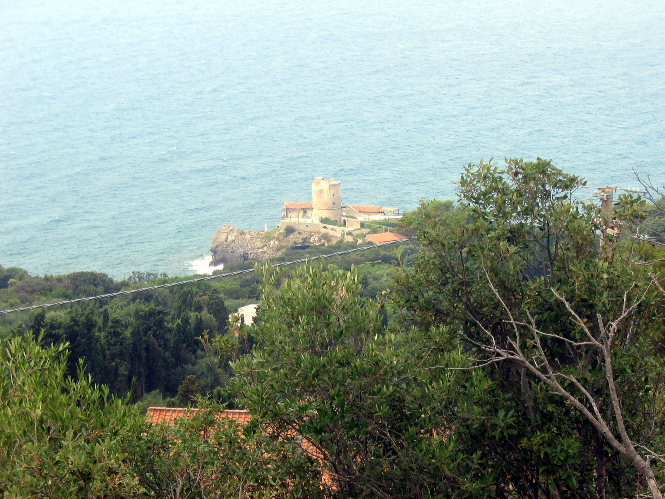 Ansedonia, Orbetello, Toscana, Italia